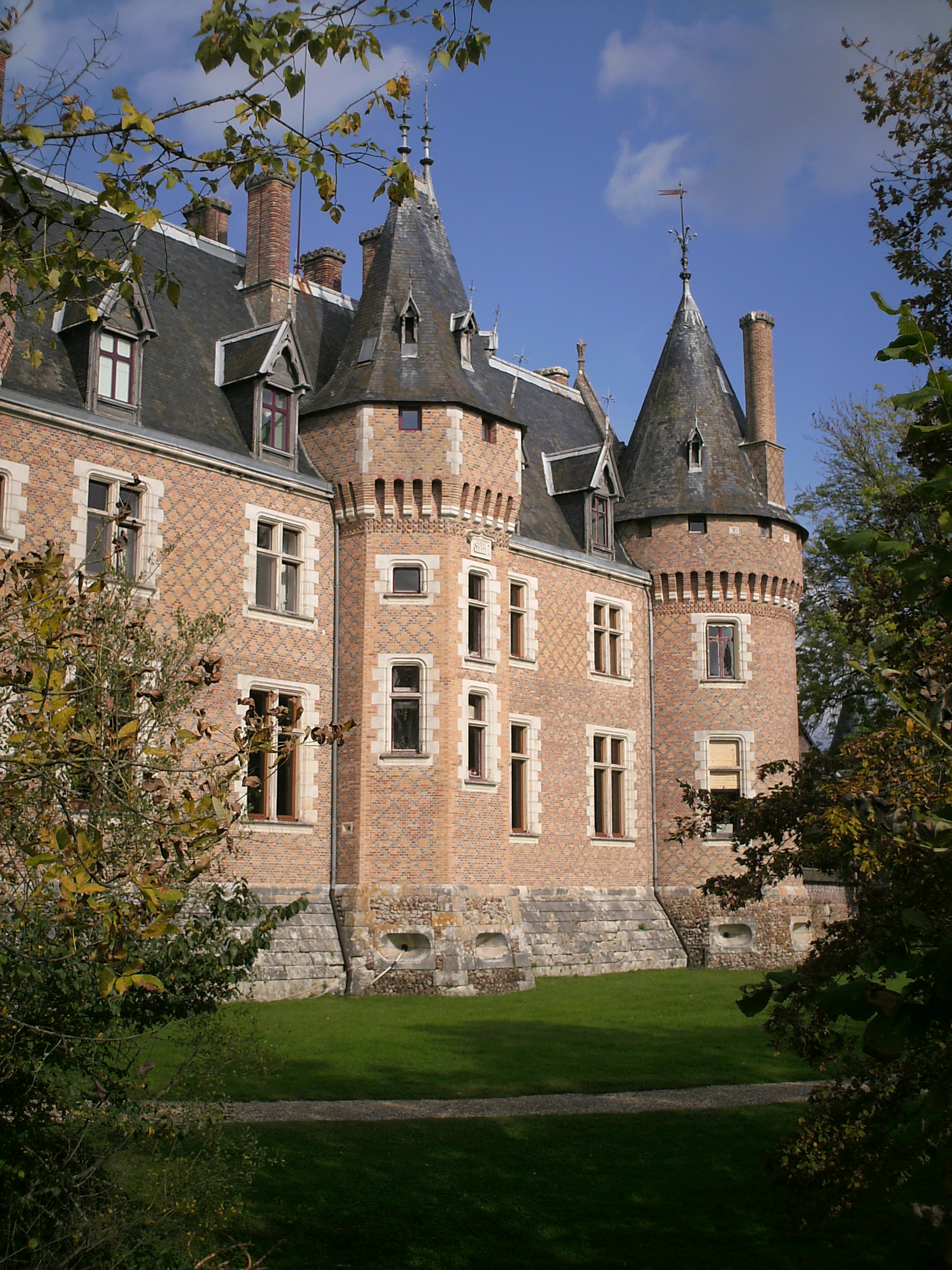 Nancay